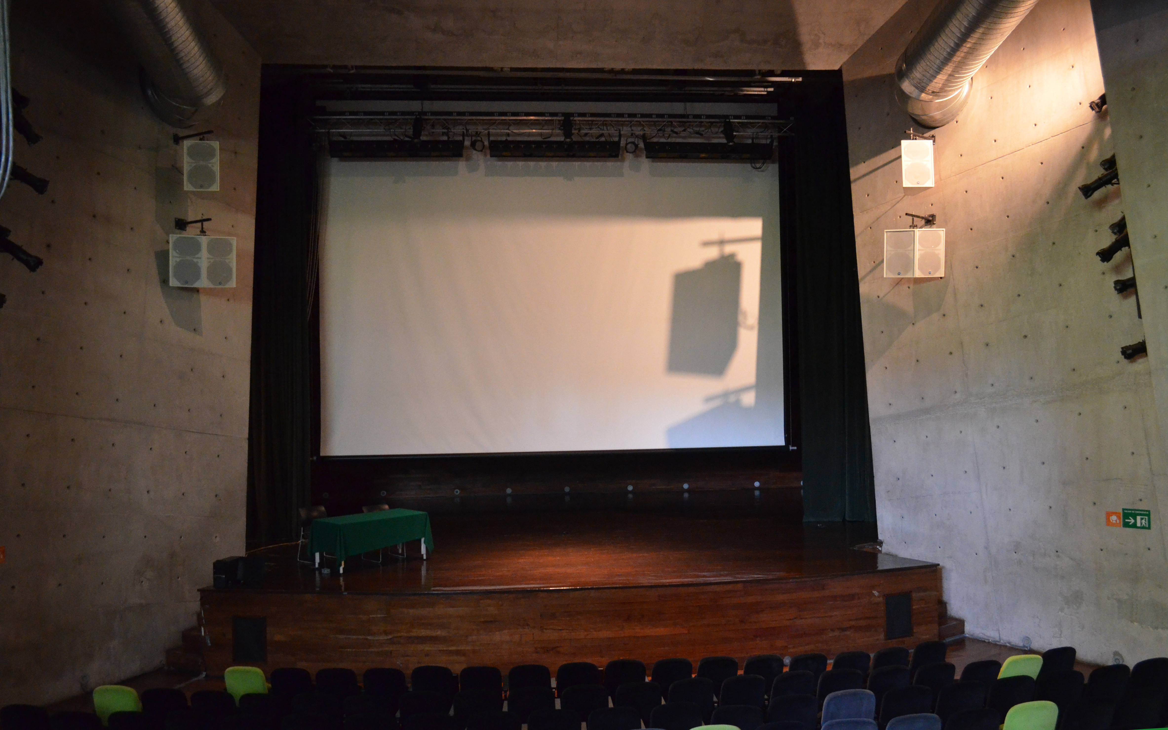 Auditorio de la biblioteca, con capacidad para 500 personas.